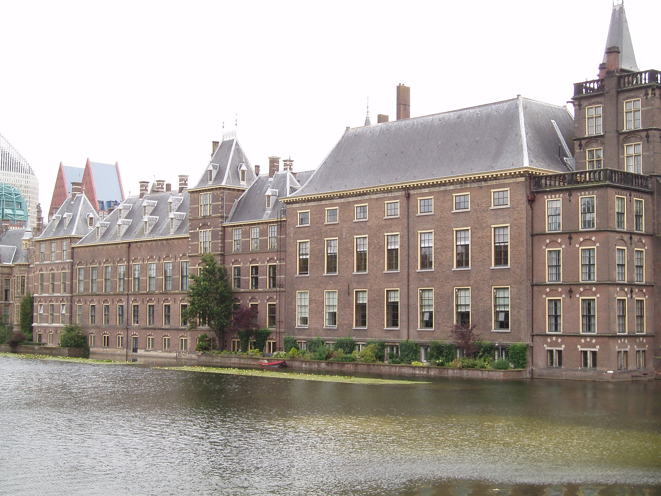 Binnenhof in Den Haag